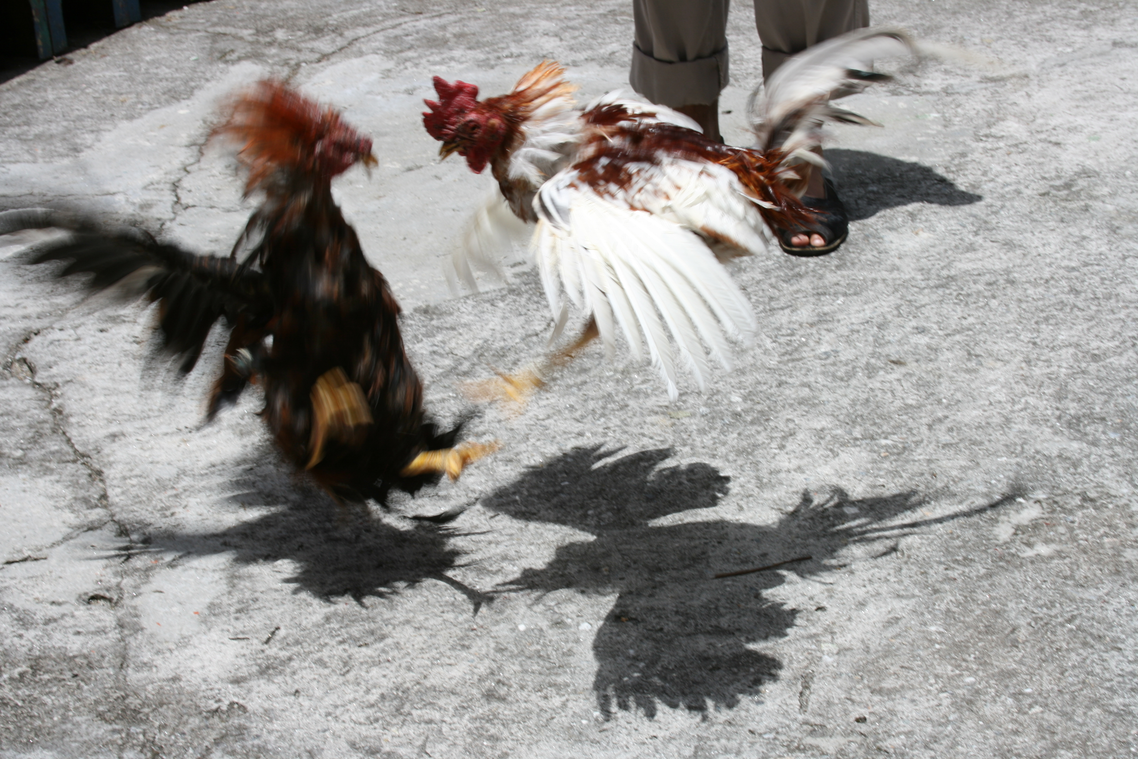 La Venezuela de Antier, Merida, Edo. Merida